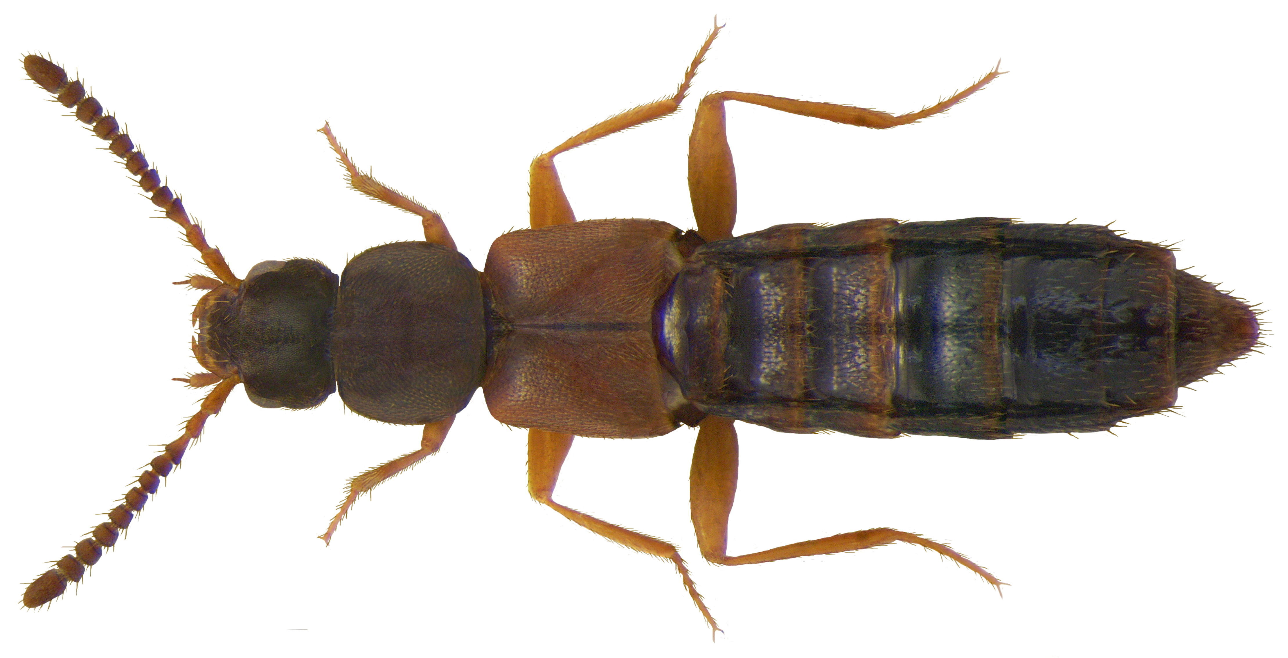 Familie: Staphylinidae Groesse: 3-3,8 mm Verbreitung: Europa Ökologie: in Humus und unter Laub Fundort: Germania, Bayern, Oberfranken, Kasendorf leg.det. U.Schmidt, 1975 Photo: U.Schmidt, 2009